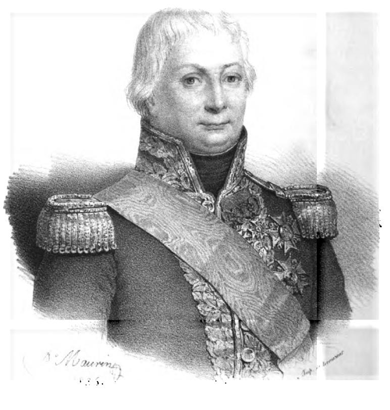 Honoré Joseph Antoine Ganteaume